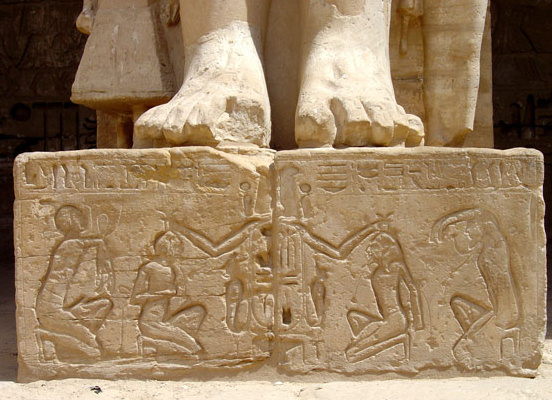 Piédestal d'un pilier osiriaque à Médinet-Habou. Le Nom de Ramsès III maintient captif deux prisonniers